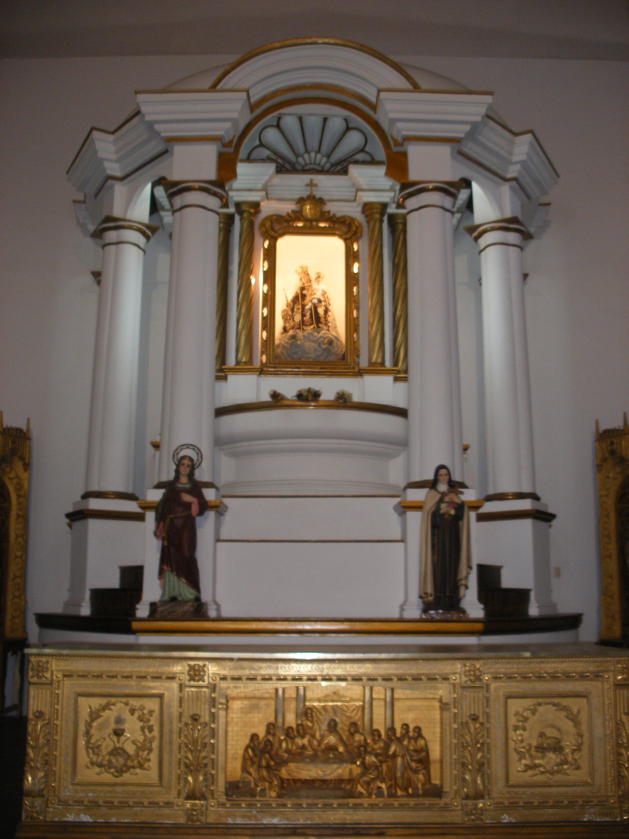 Detalle del Mesón Eucarístico y del Retablo de Ntra. Sra. del Carmen en la Capilla homónima o "Del Sagrario", adyacente en la Santa Iglesia Catedral de Maracaibo (Zulia-Venezuela).